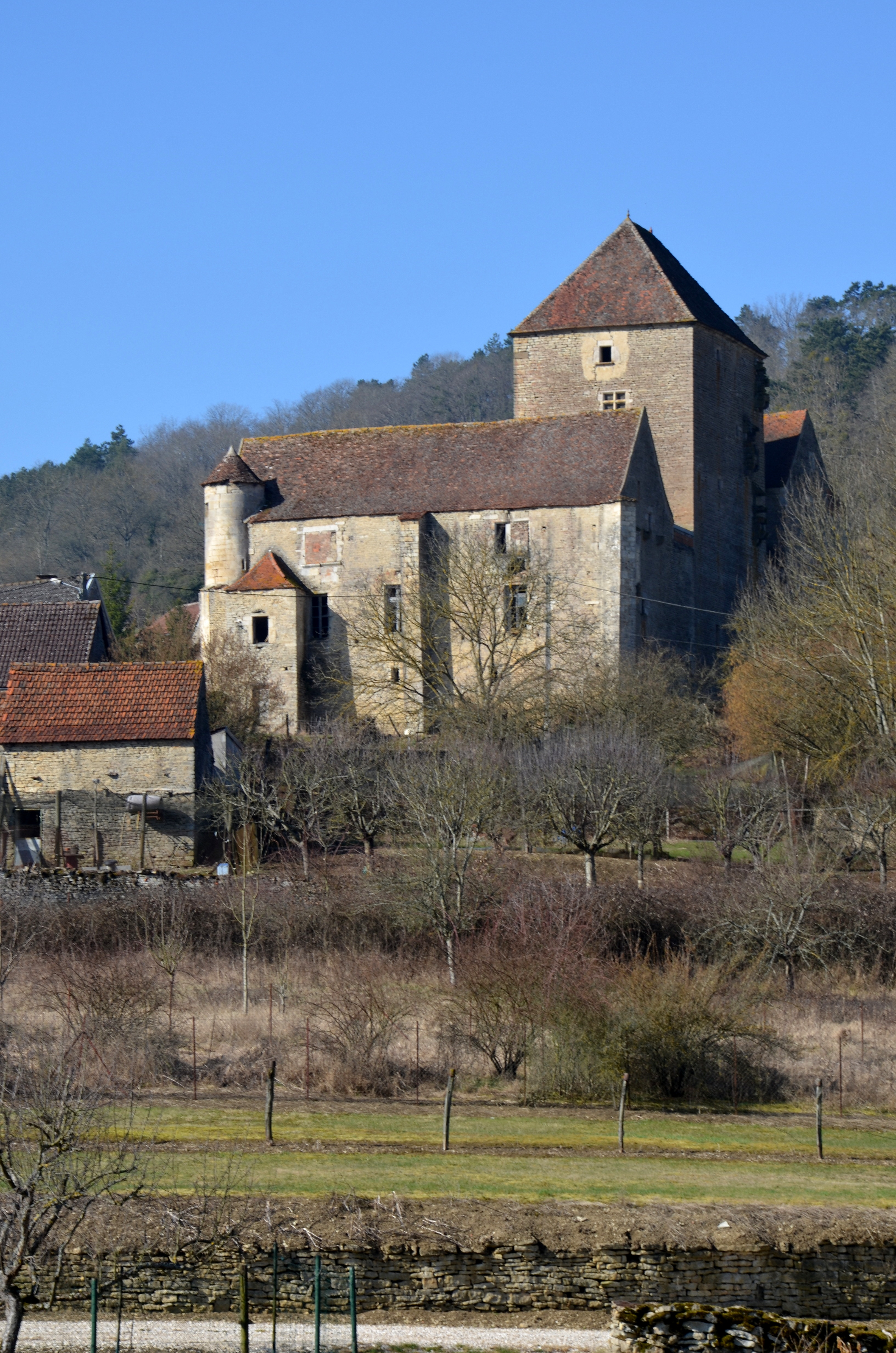 Maison forte a Courcelle les Montbard , Côte d'Or, Bourgogne, France